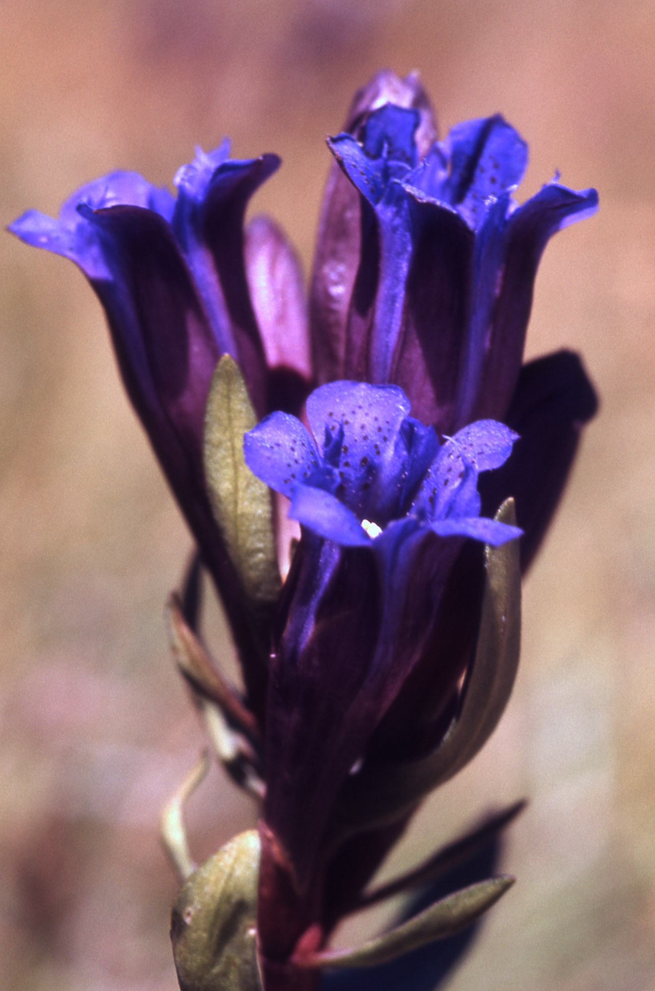 Gentiana affinis